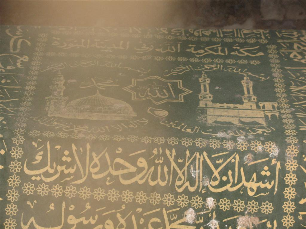 קברו של עלאא' א-דין ברבאט אלבציר